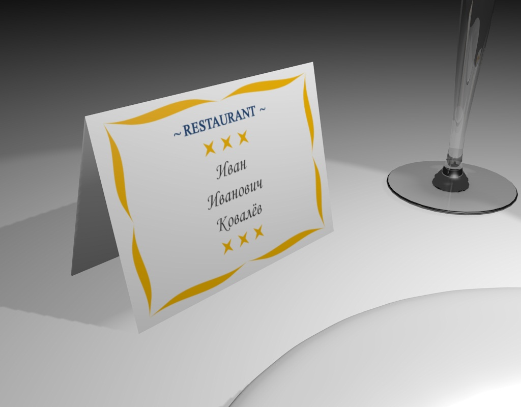 Рисунок с изображением кувертной карточки